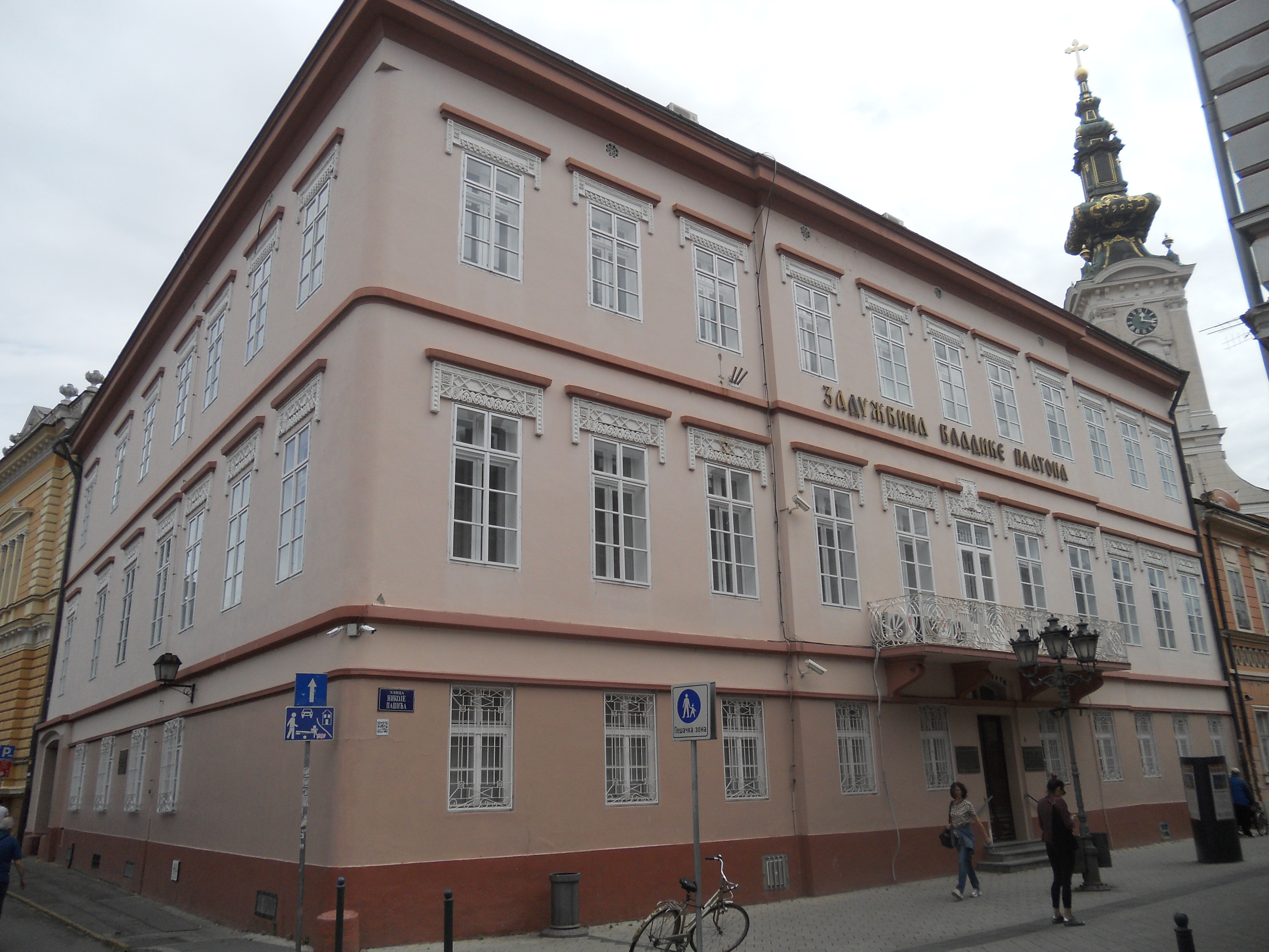 Zgrada Platoneuma